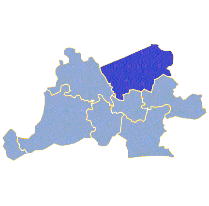 Powiat gorzowski - Gmina Kłodawa